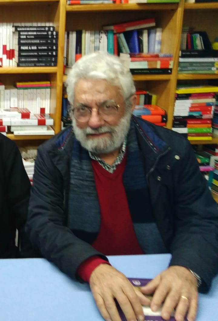 Presentación de "O tempo escuro" na Libraría Paz de Pontevedra: Anxo González Guerra, Modesto Hermida e Bieito Ledo